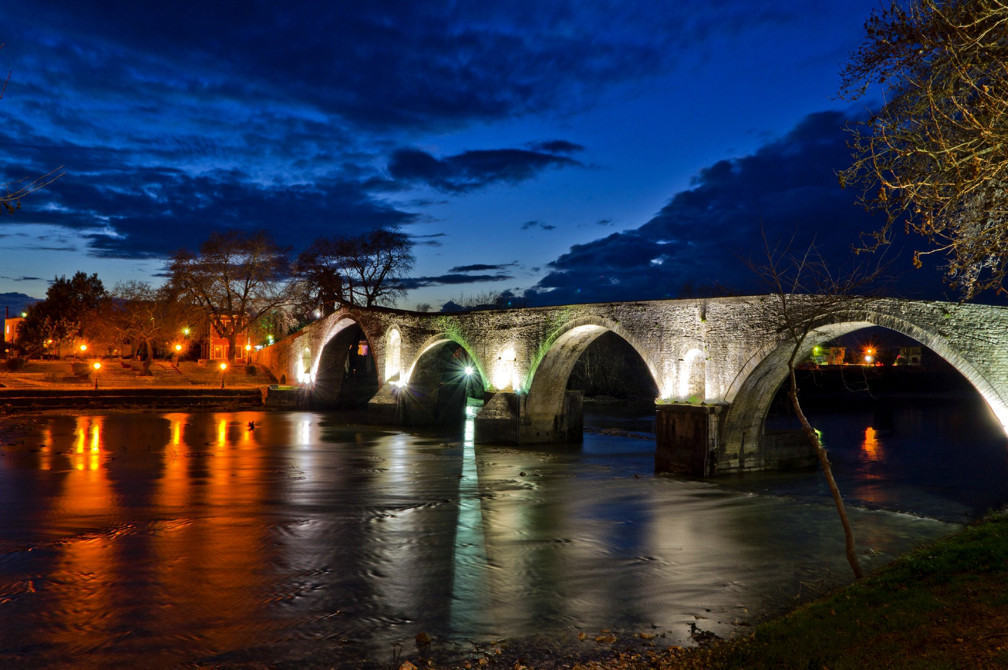 Γεφύρι της Άρτας«Γεφύρι της Άρτας»